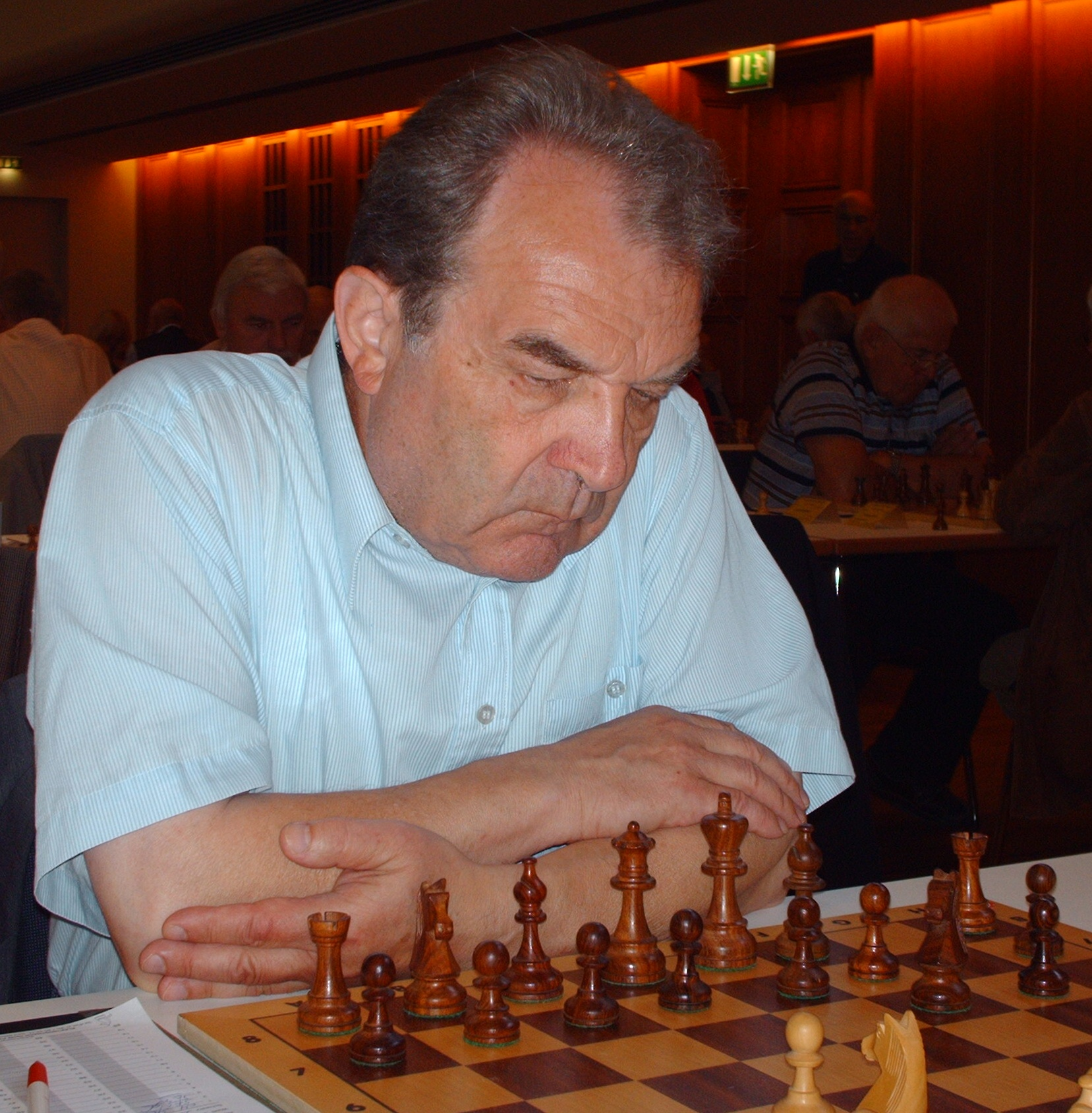 IM Heinz Liebert bei der Deutschen Senioren-Mannschaftsmeisterschaft der Landesverbände in Berlin-Spandau